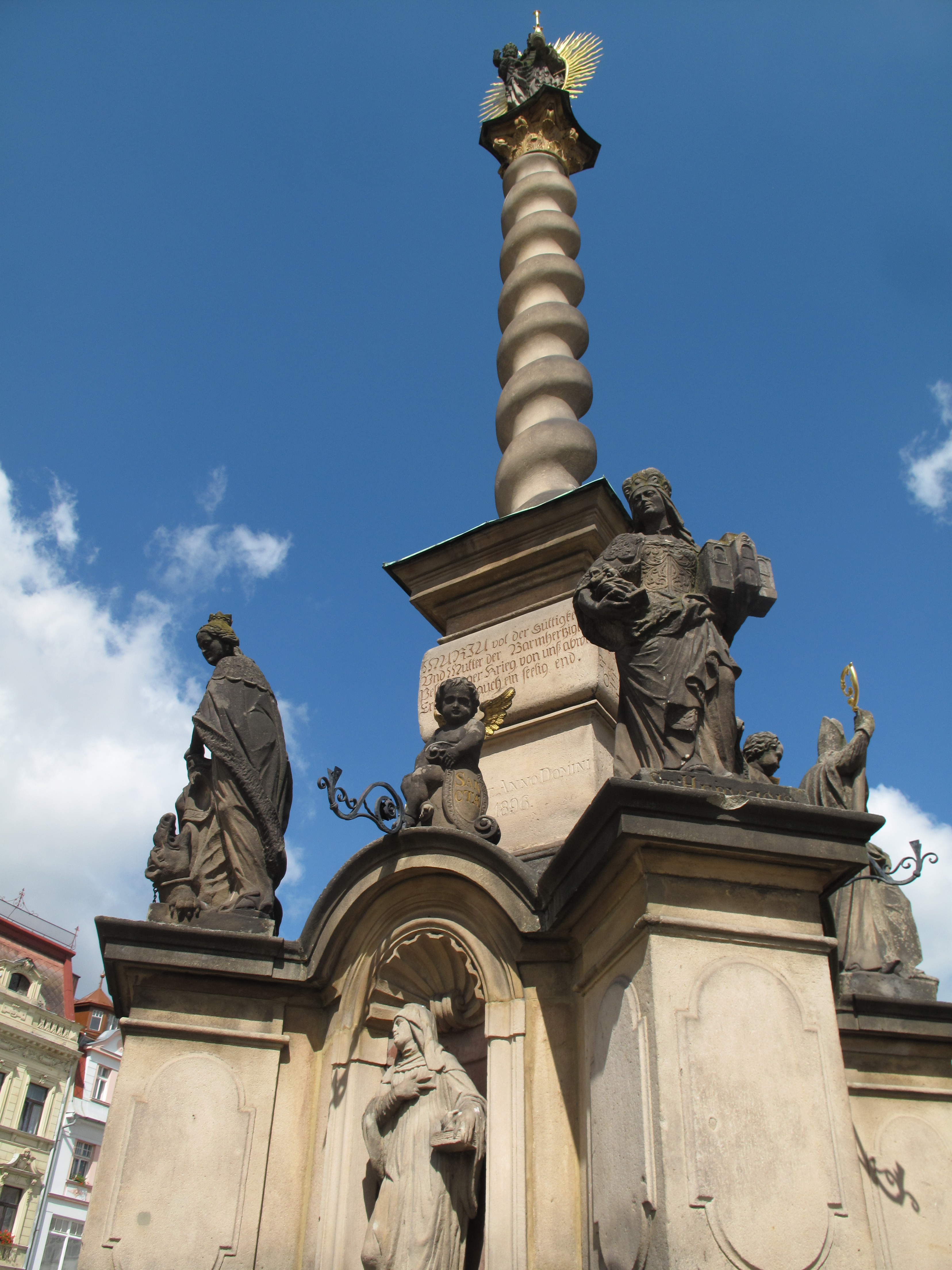 Česky: Broumov